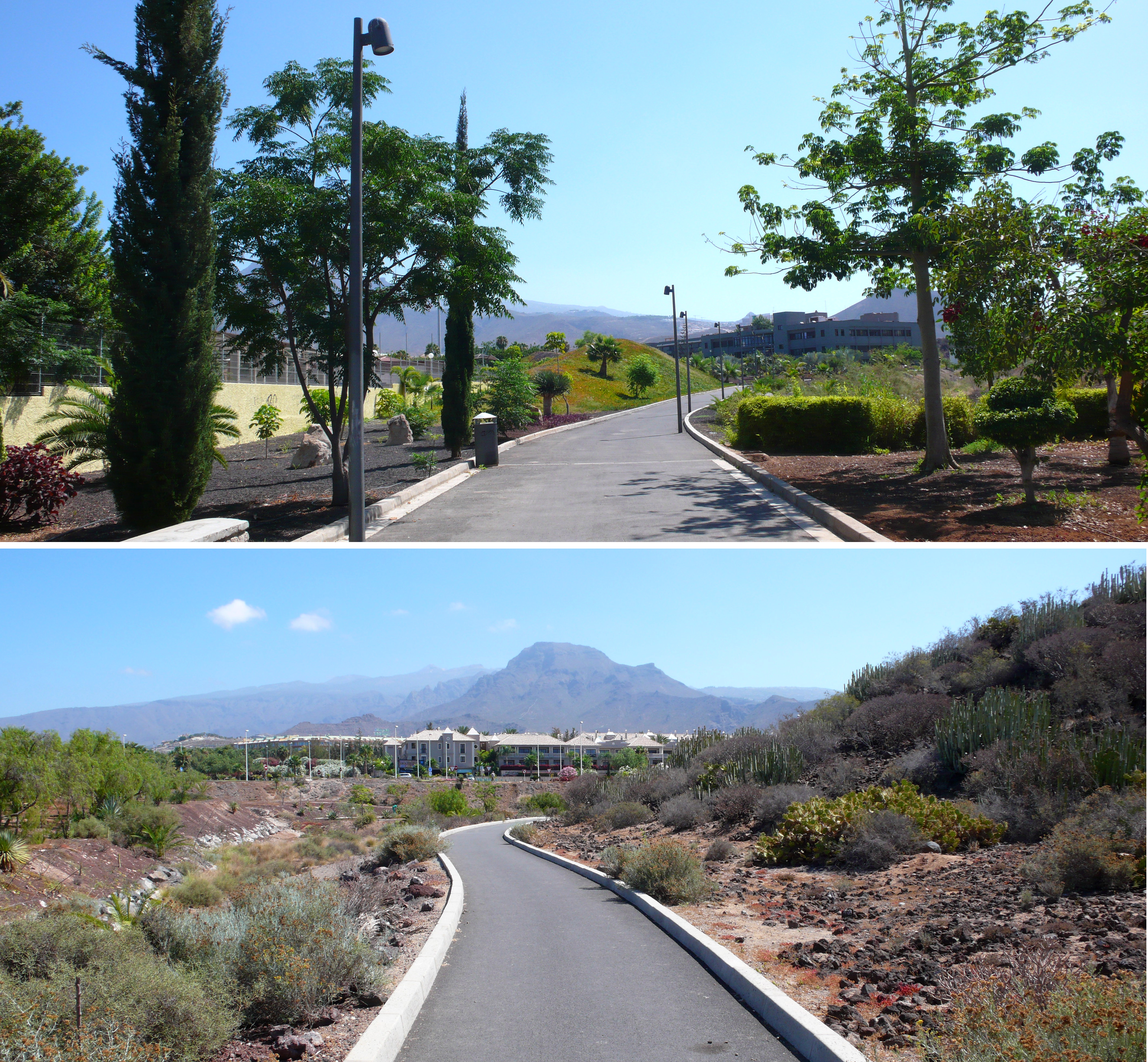 Dos vistas del Parque Central de Arona.